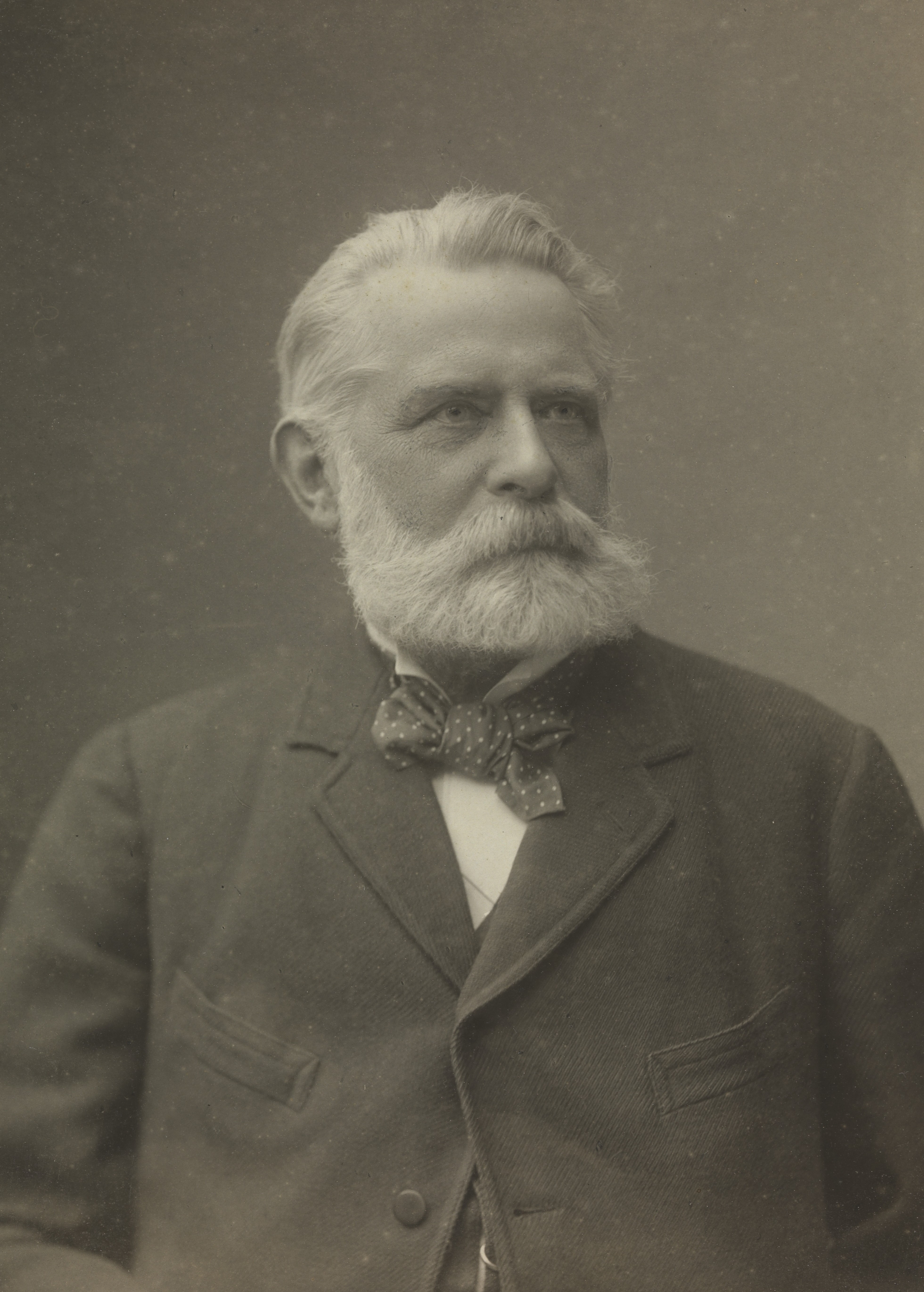 Raymond Lee Newcomb . Med dedikasjon. Depicted person: Newcomb, Raymond Lee Depicted place